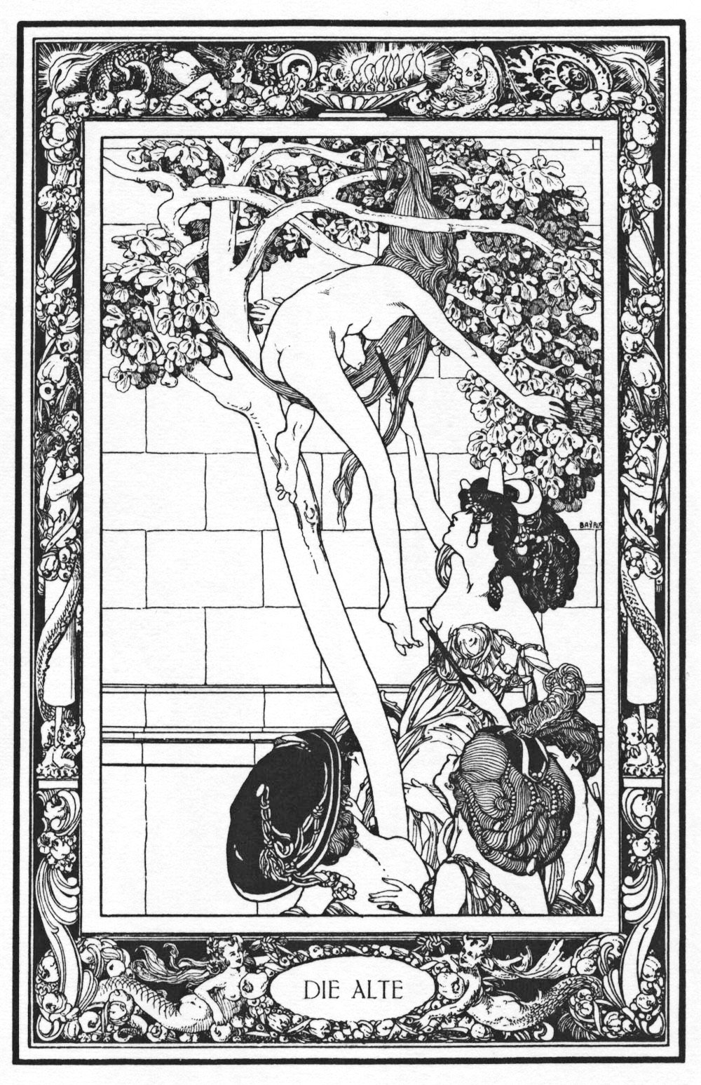 Illustration for Giambattista Basile's "Pentamerone".